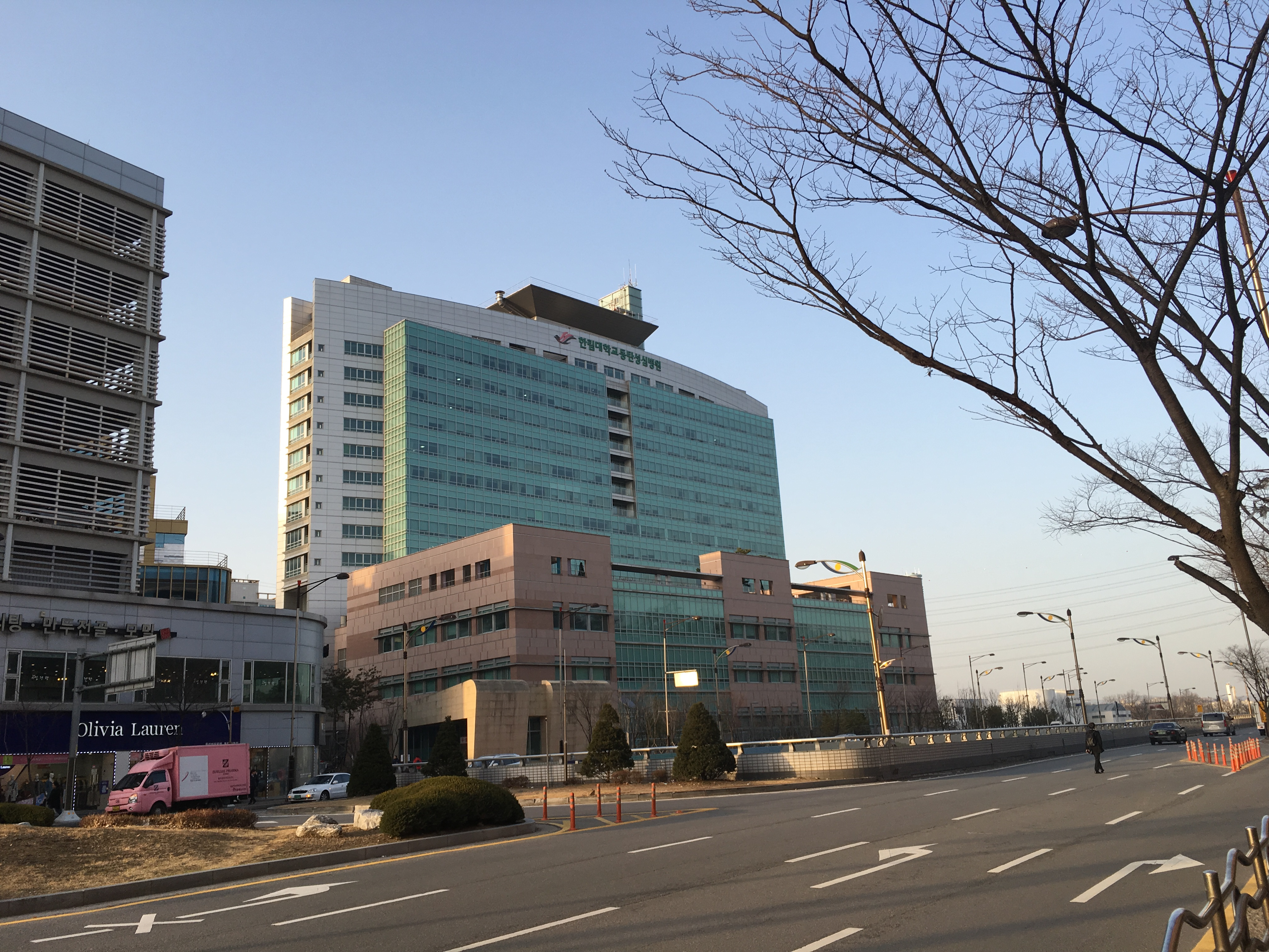 한림대학교 동탄성심병원